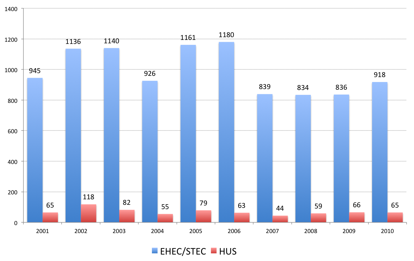 Übermittelte EHEC/STEC- und HUS-Fälle nach Jahr und Meldekategorie, Deutschland, Fälle entsprechend der Referenzdefinition des RKI; Datenstand: 25.05.2011